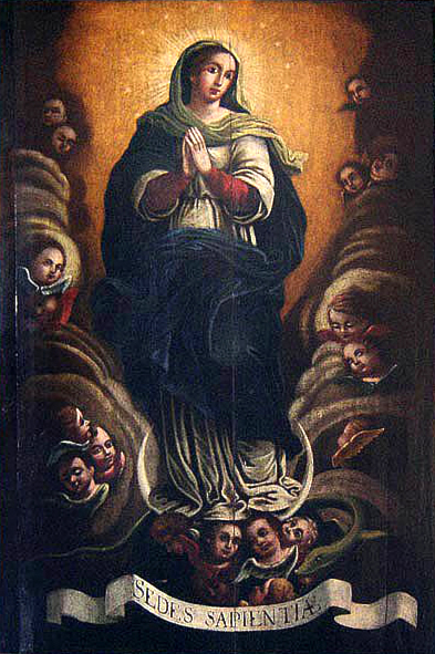 Nossa Senhora da Conceição, a Sedes Sapientiae, na sacristia da Sé de Olinda, Pernambuco, Brasil.